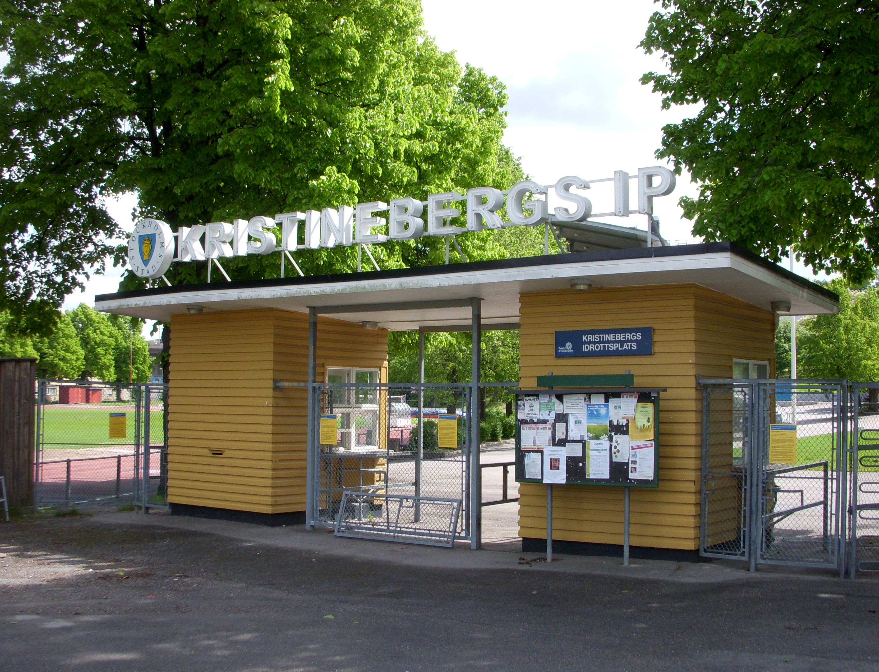 Kristinebergs idrottsplats, entré